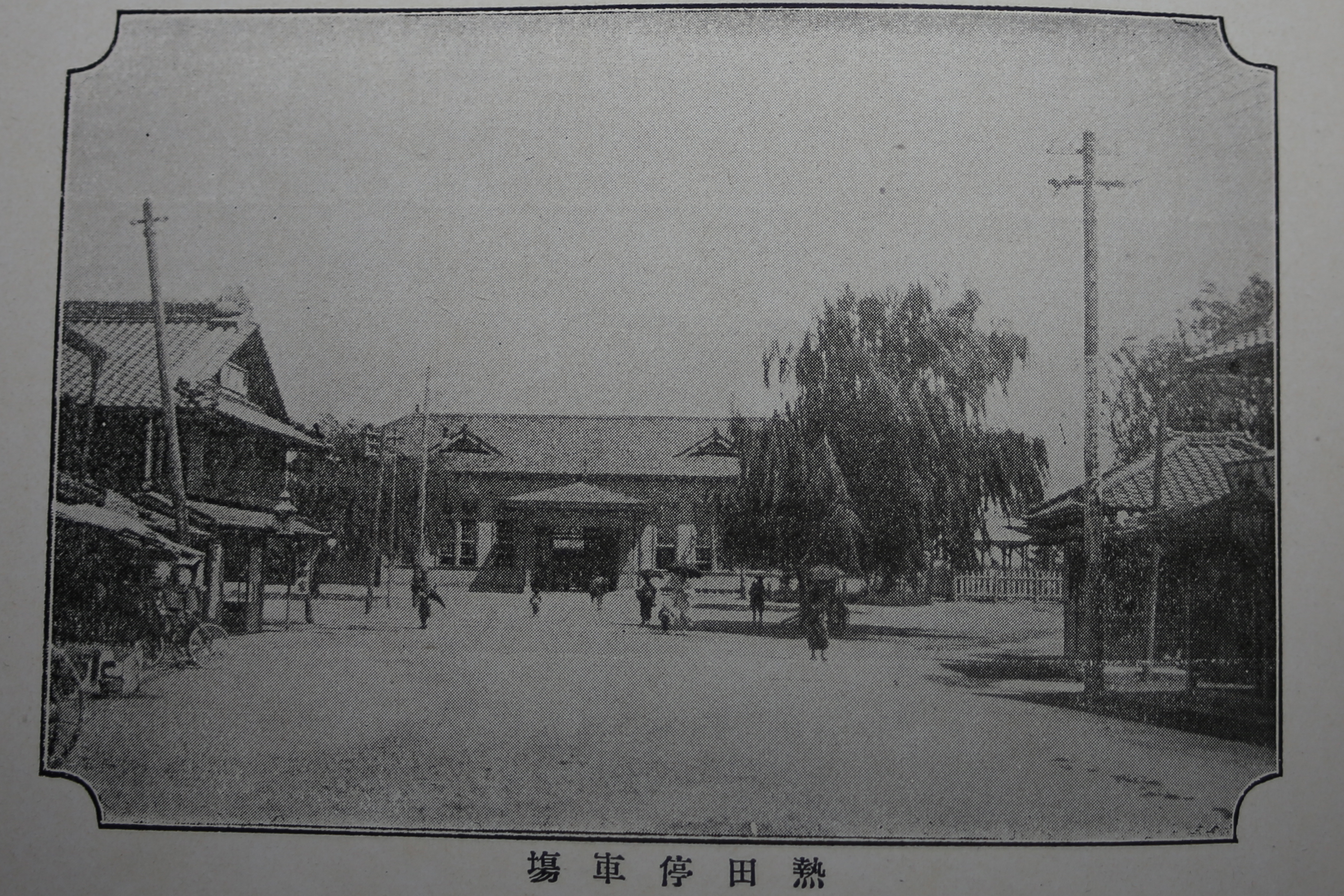 『名古屋案内』（名古屋開府三百年記念会編、扶桑新聞社、1910年3月発行）35ページ掲載の「熱田停車場」の写真。撮影時期および撮影者は不明。